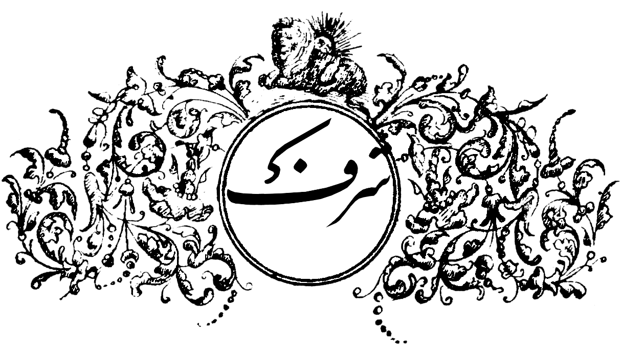 لوگوی ماهنامه شرف